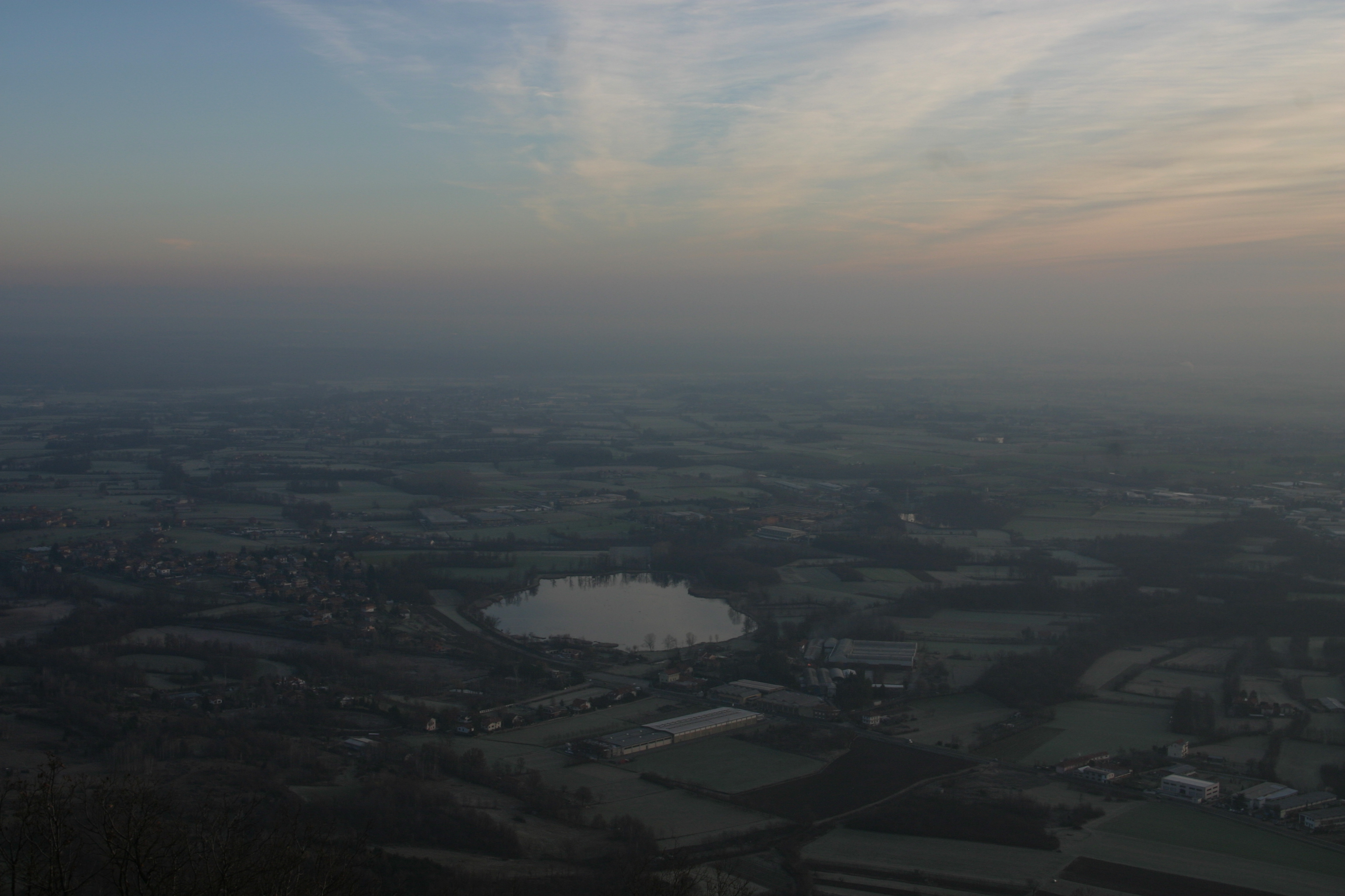 Monte Musiné e Laghi di Caselette (Q49964176)